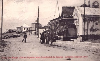 Postal com foto p/b mostrando o terminal do Elétrico de Sintra na Praia das Maçãs.